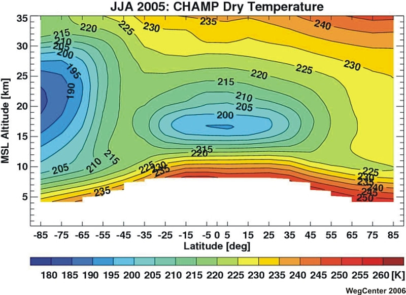 Grafik der Forschungsgruppe ARSCliSys